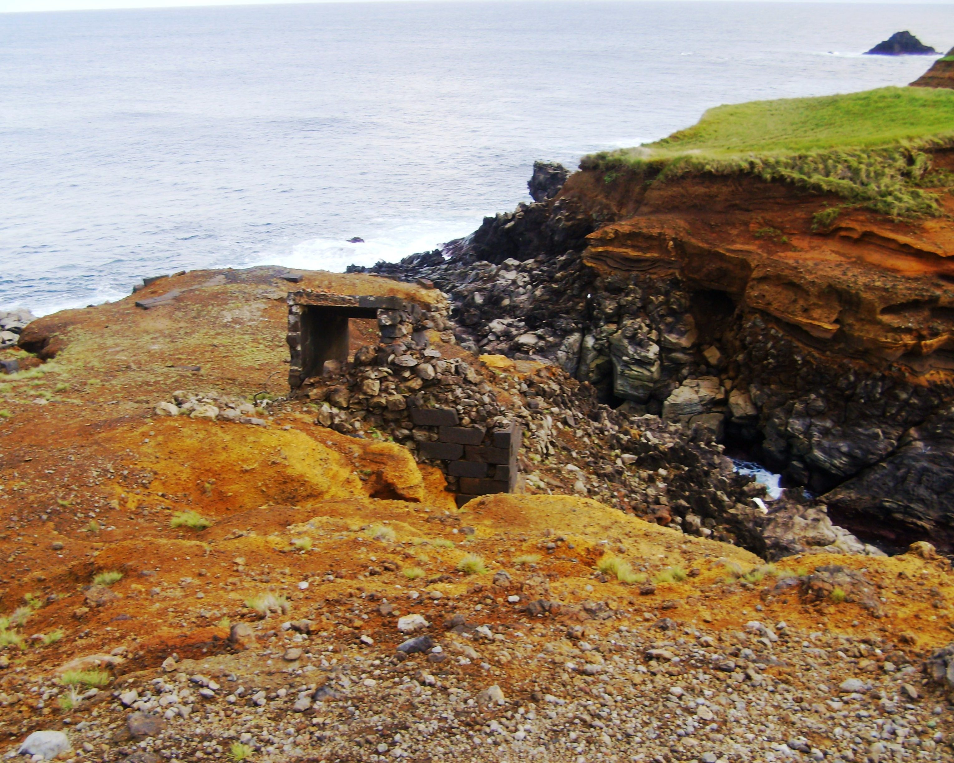 Forte do Bom Jesus, freguesia de São Sebastião, concelho de Angra do Heroísmo, Ilha Terceira, Açores.